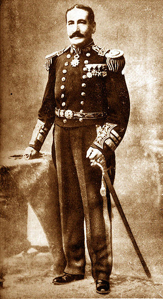 Juan José Latorre Benavente (Santiago; 24 de marzo de 1846 - 9 de julio de 1912) Marino chileno, uno de los principales actores de la Guerra del Pacífico.